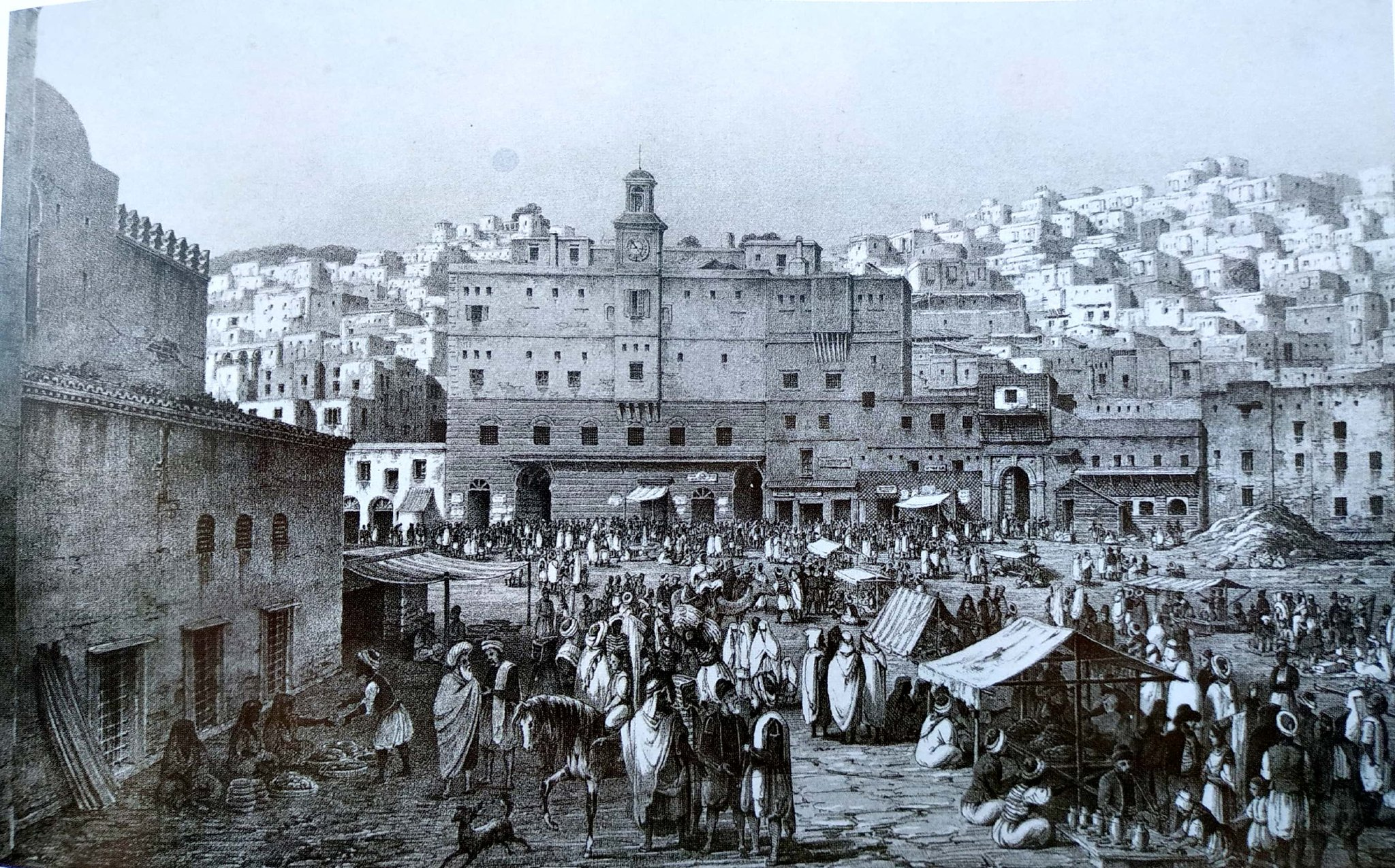 Palais de la Jenina et actuelle place des martyrs en 1832